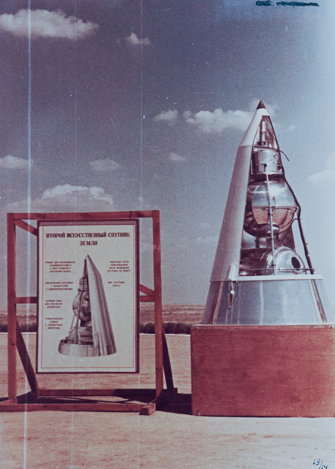 16 марта 1962 года Капустин Яр из ракетного полигона превратился в космодром. В тот день был осуществлен запуск спутника Космос-1. С космодрома Капустин Яр стартовали небольшие исследовательские спутники, для запуска которых использовались ракеты-носители небольшой мощности серии «Космос». На фото: Спутник-2